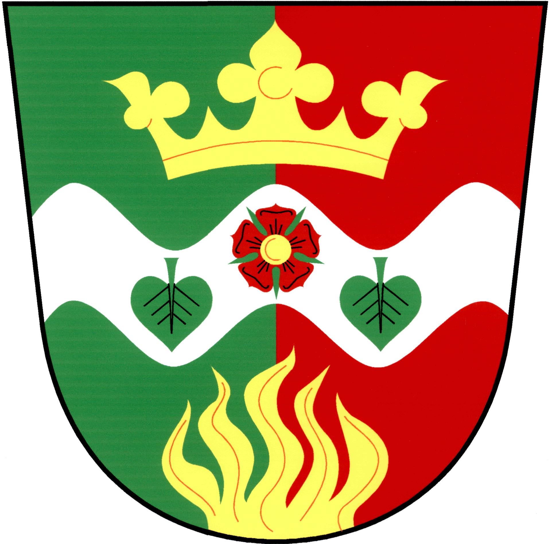 Znak obce Drnovice